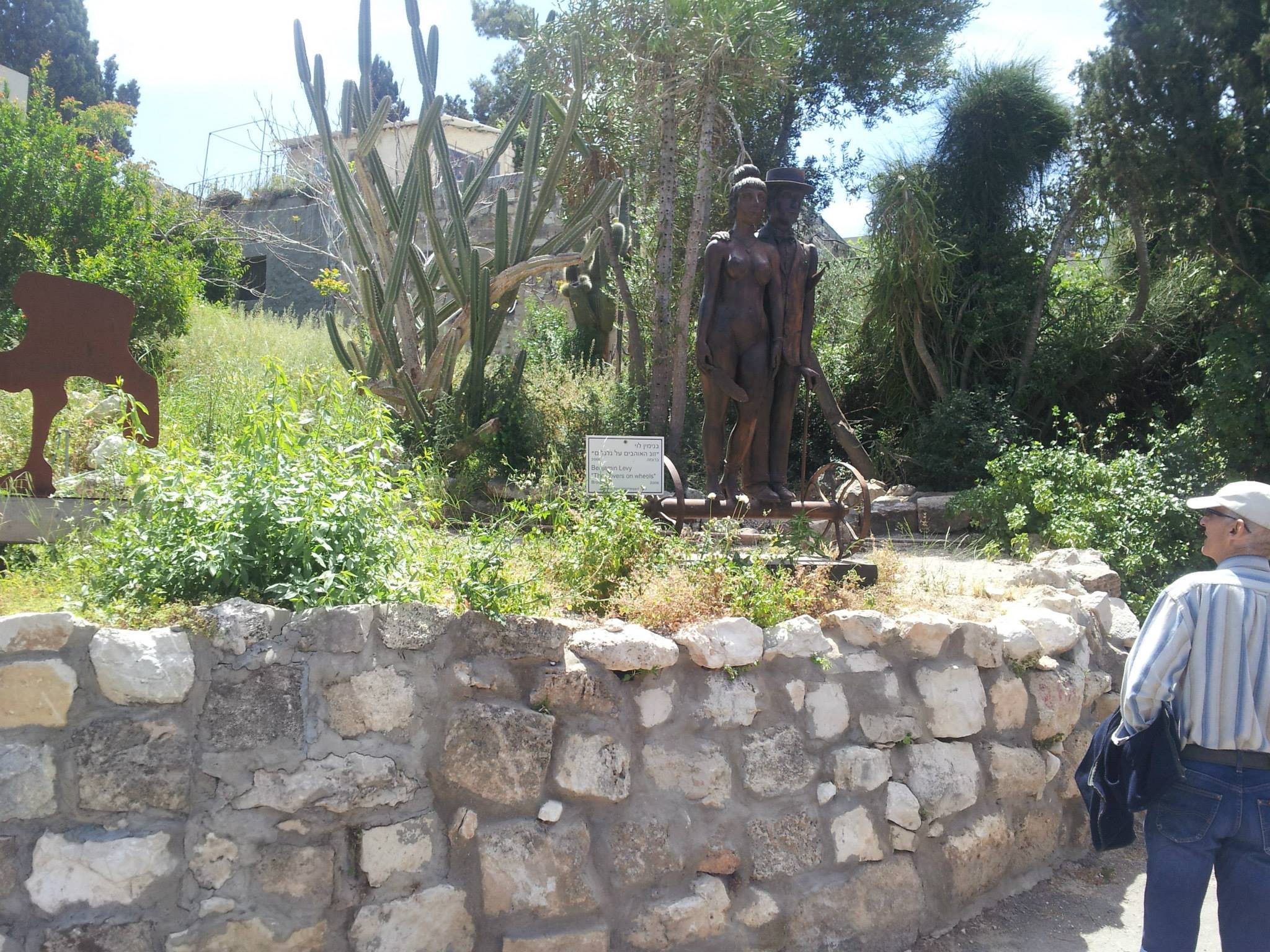 פיסול סביבתי בעין הוד